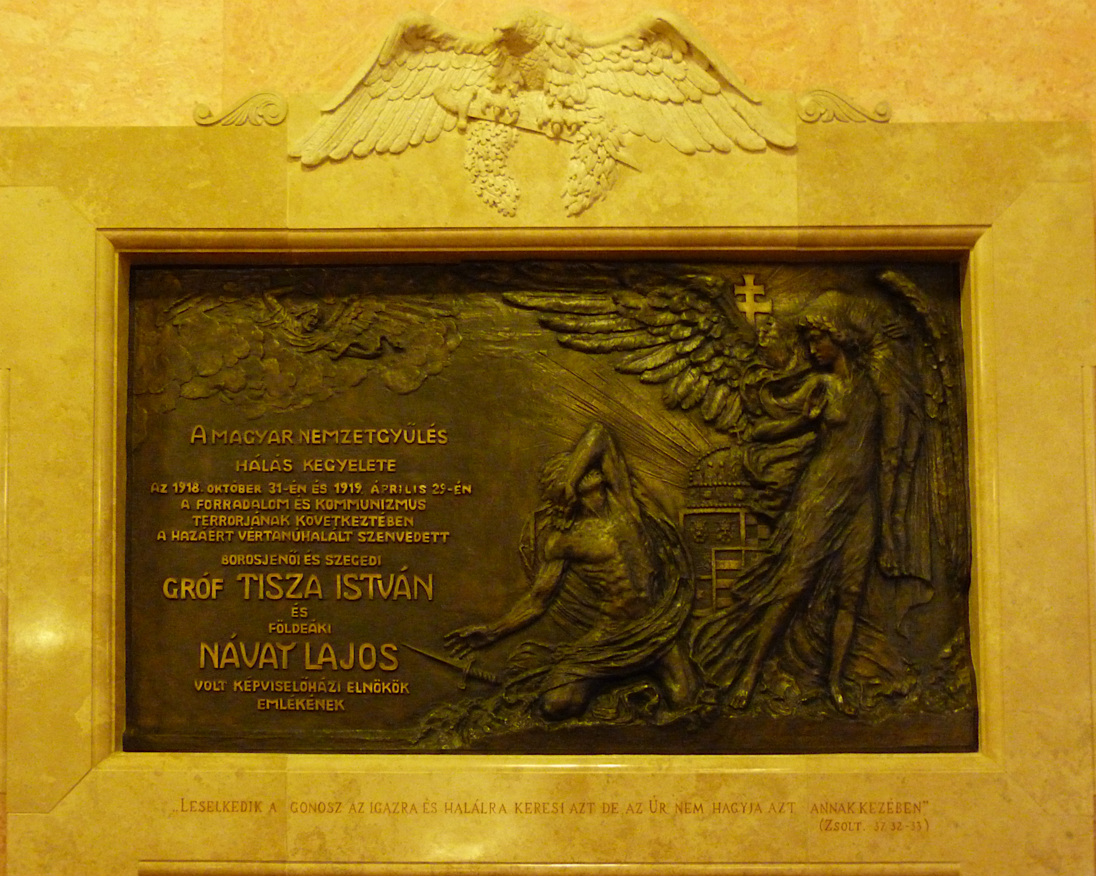 A felvétel 2015. március hó 9-én, hétfőn készült Budapesten, az Országházban. Emlékmű az országház falában, szövege: A Magyar Nemzetgyűlés hálás kegyelete. Az 1918. október 31-én és 1919. április 29-én a forradalom és kommunizmus terrorjának következtében a hazáért vértanuhalált szenvedett borosjenői és szegedi gróf Tisza István és földeáki Návay Lajos volt képviselőházi elnökök emlékének. (Keviczky Hugó, 2011, Nem köztéri. A delegációs terem bejáratának bal oldalánál)